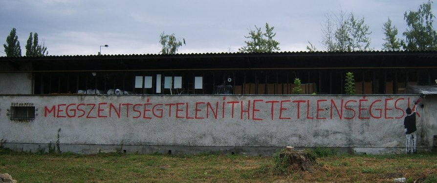 Graffiti, Balatonlelle, Hungary